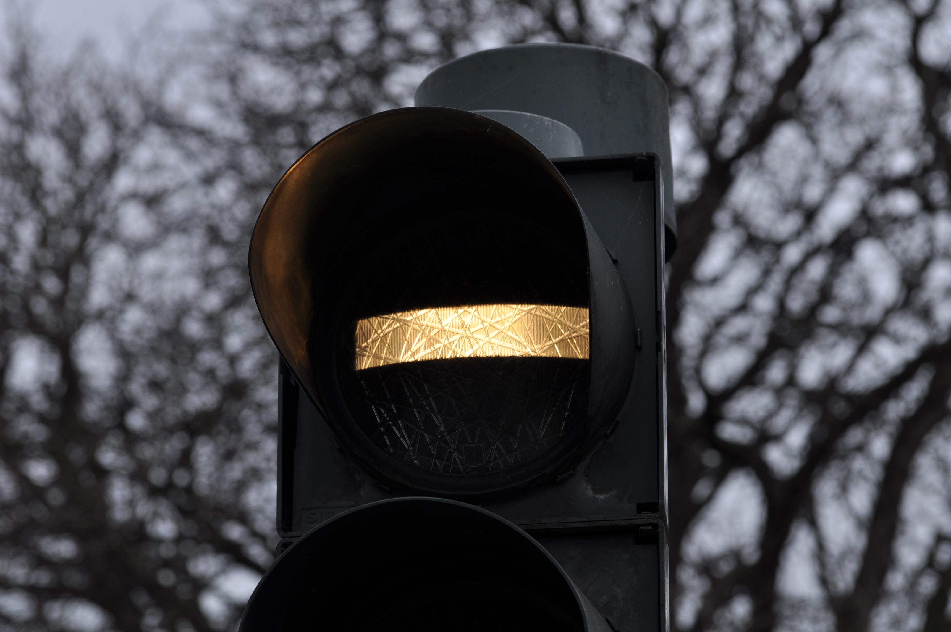 Busampel, Göttingen, Nikolausberger Weg/Weender Landstraße, 2.1.2014. Foto: Francisco Welter-Schultes.